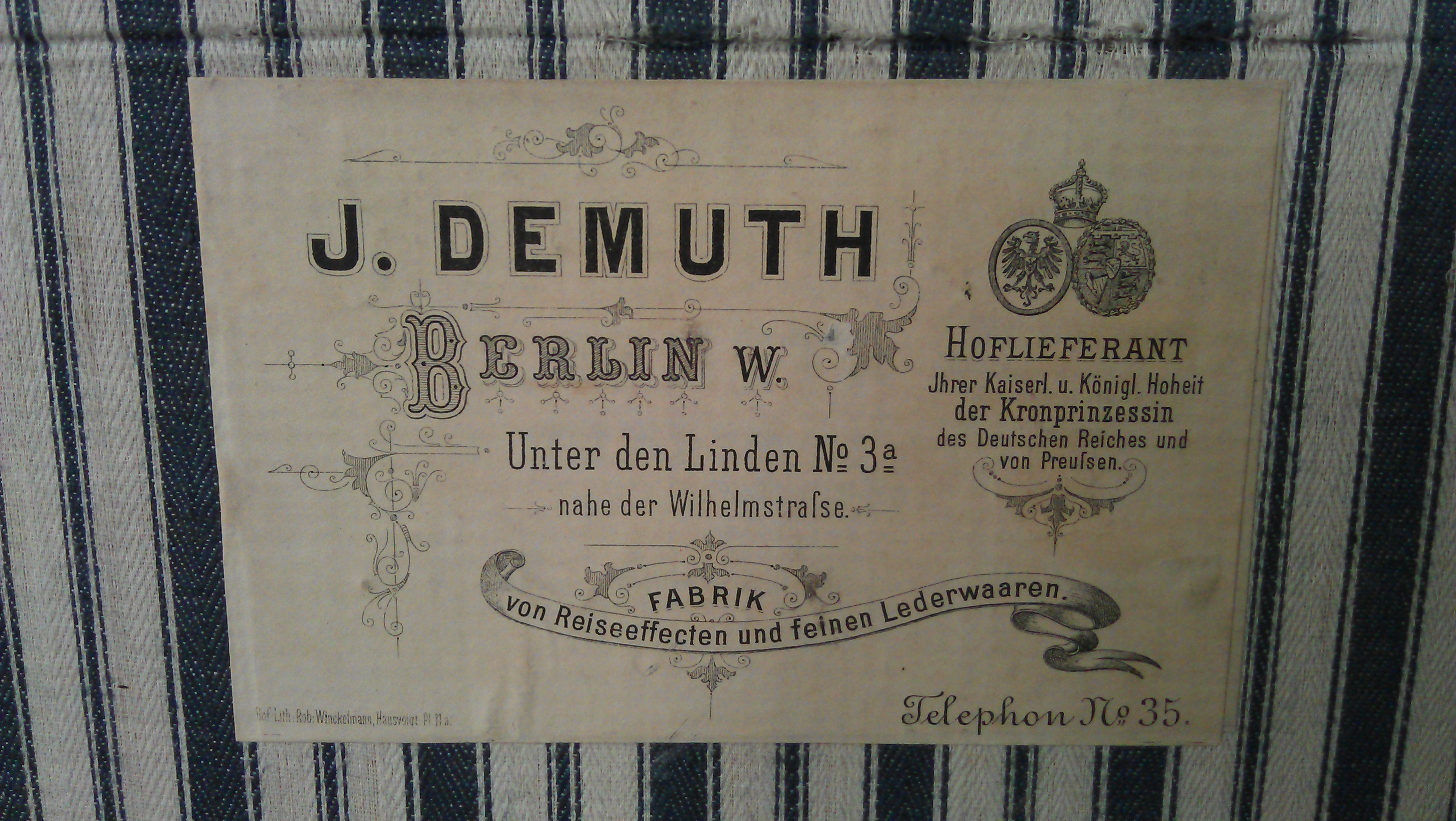 Das Etikett ist auf der Stoffbespannung im Inneren eines Reisekoffers mit dem Schild "Graf von Bismarck" angebracht